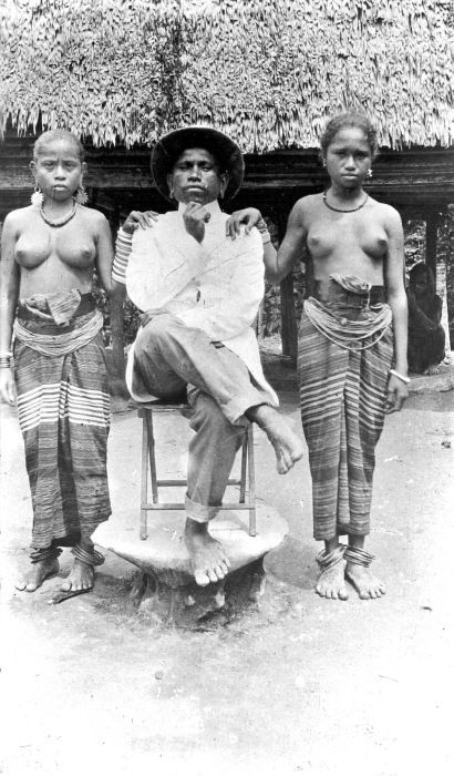 Repronegatief. De eilanden van de Zuidoost-Molukken (o.m. Wetar, Leti, Damar, Babar, Tanimbar, Kei en Aroe) zijn en waren zeer dunbevolkt. In de tijd van de VOC en van het koloniaal bewind had men het over de Zuidwester- en de Zuidooster-Eilanden. De VOC stuurde er jaarlijks vanaf Banda een schip heen om na te gaan of er nog 'vreemde schepen' gesignaleerd waren en om de vlag te laten zien. Verder haalde men er bijenwas, schildpadhoorn en klapperolie. Inheemse hoogwaardigheidsbekleders kregen van de VOC een stok met knop met daarop het VOC wapen. Op de foto een traditioneel Tanimbarees woonhuis op palen achter zo'n hoogwaardigheidsbekleder en twee vrouwen met kokerrokken en sieraden (erfstukken). (P. Boomgaard, 2001). Het kamponghoofd van Krawain-Aloes met zijn zuster en nicht, Tanimbar-eilanden